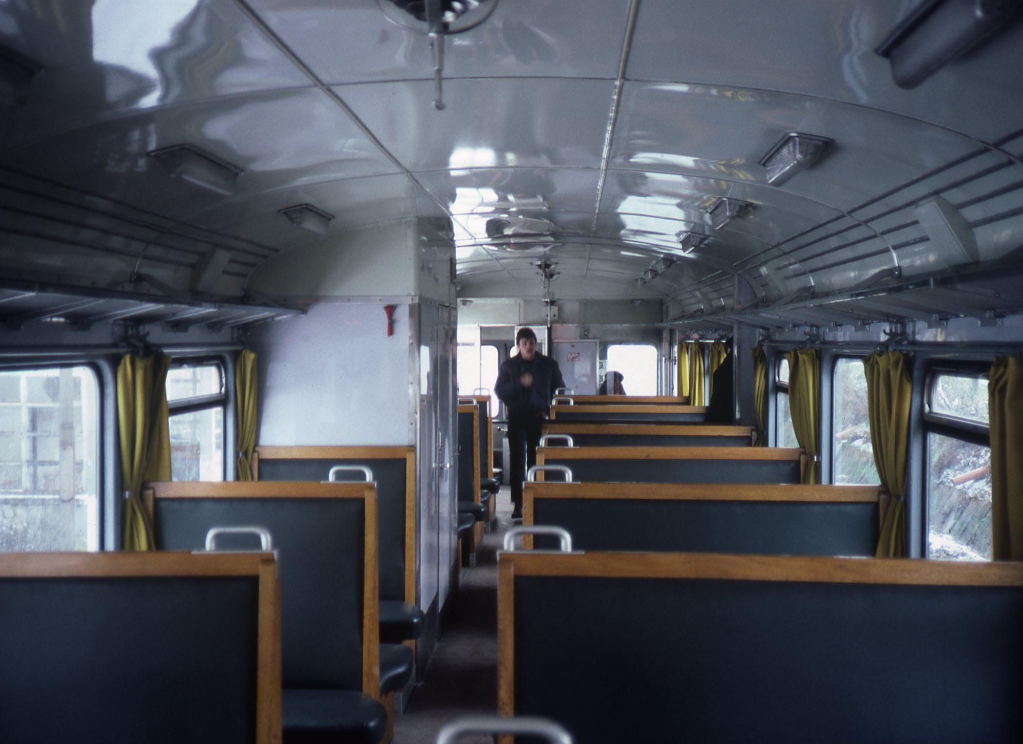 De interieur van een type 46 autorail onderweg naar Aat